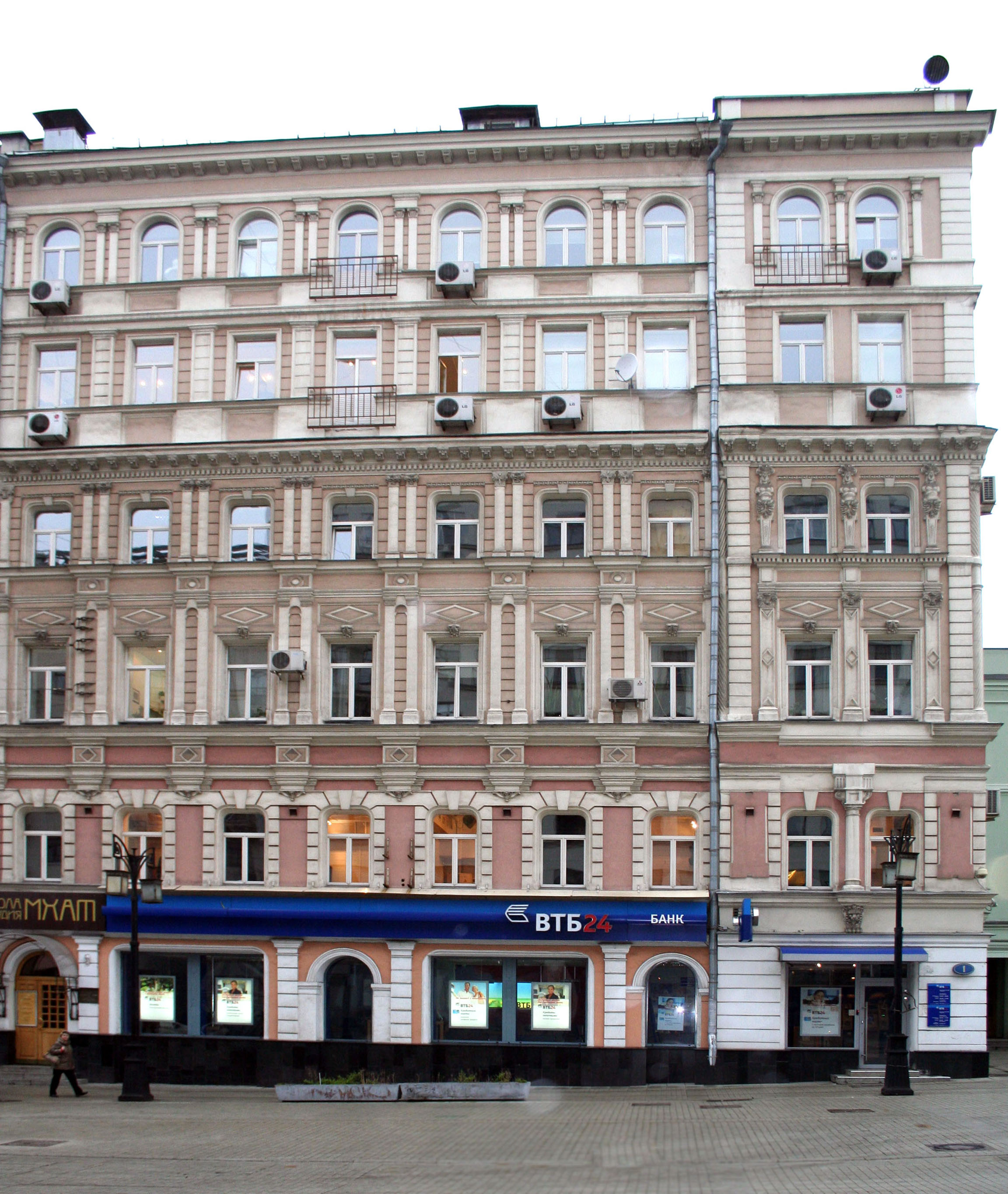 Камергерский переулок, 1